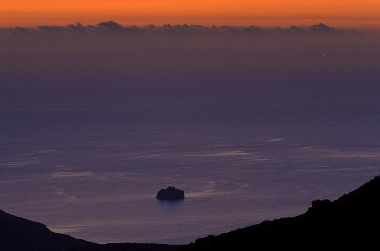 Bild zeigt eine Felsformation an der Ostküste von Mallorca. bekannt unter dem Namen: Faralló_d’Albarca. Unbewohntes Eiland